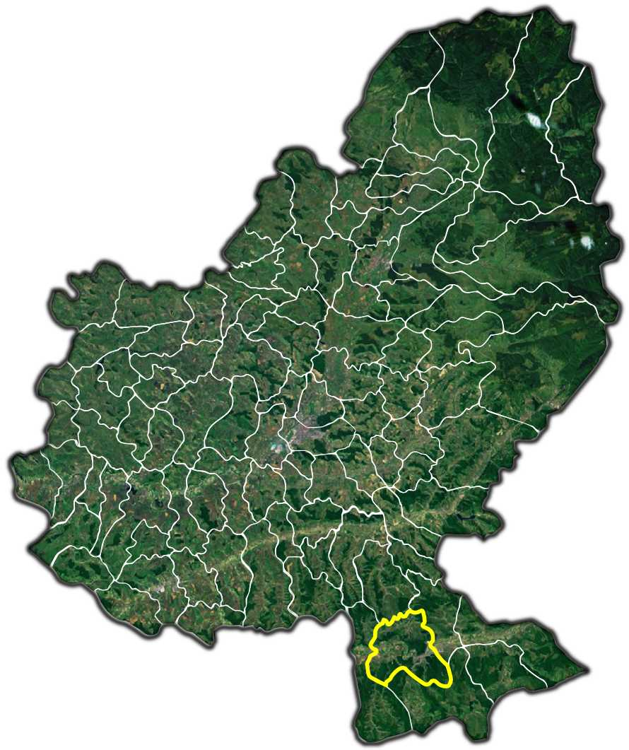 Sighisoara jud Mures